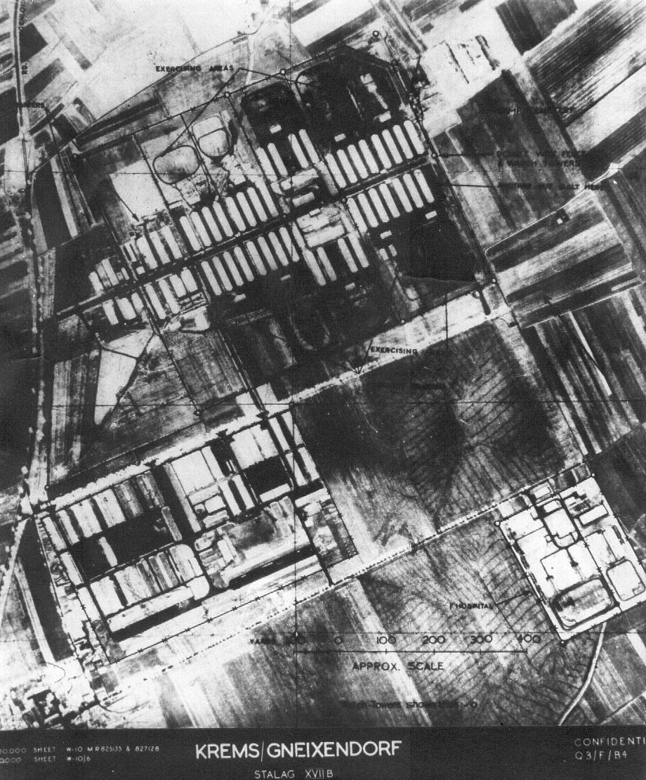 Luftaufnahme des STALAG XVIIb in Krems-Gneixendorf von einem amerikanischen Aufklärungsflugzeug